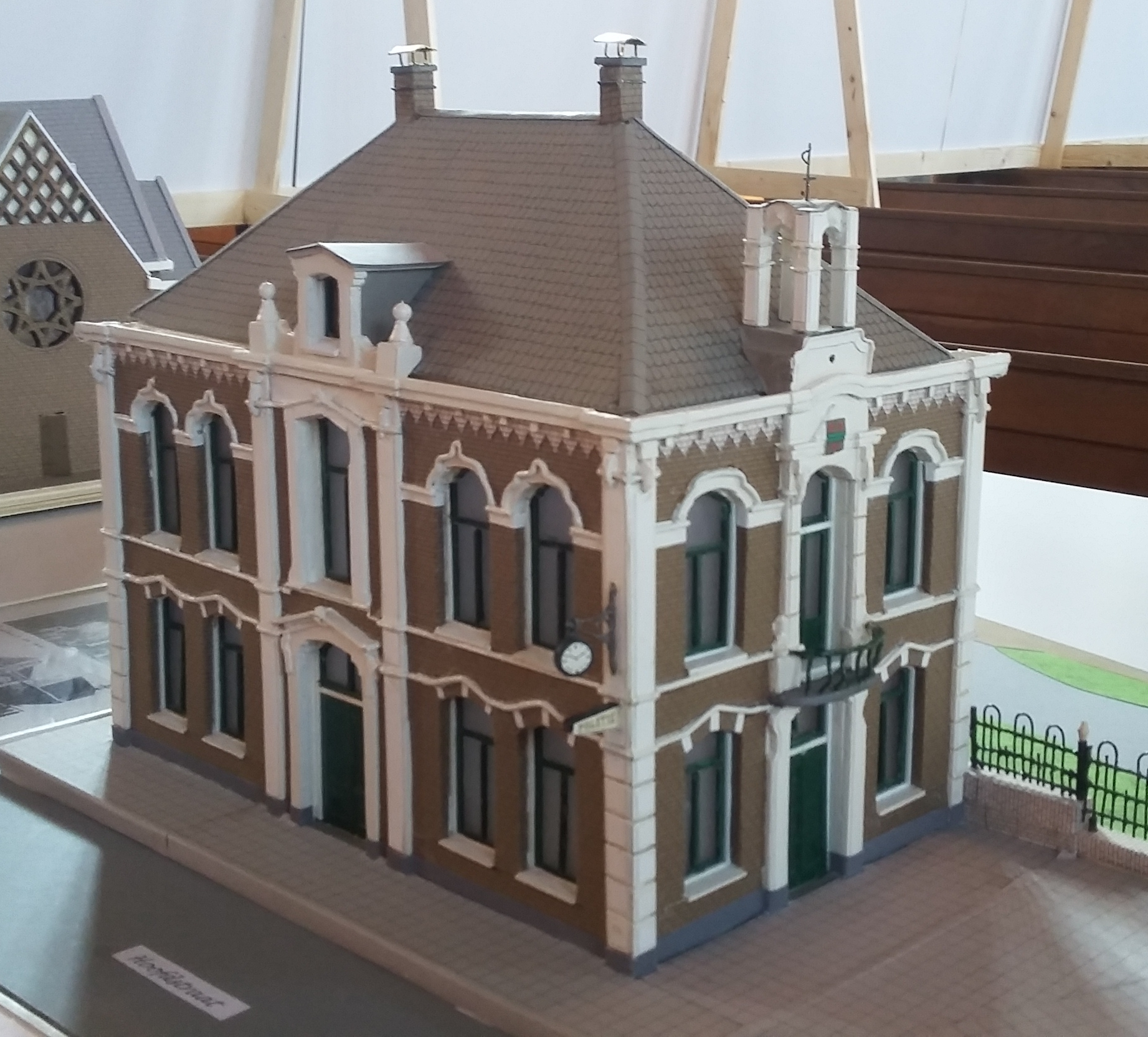 Maquette (2015, Job Steenvoorden) van het Oude Raadhuis dat in 1961 is afgebroken.